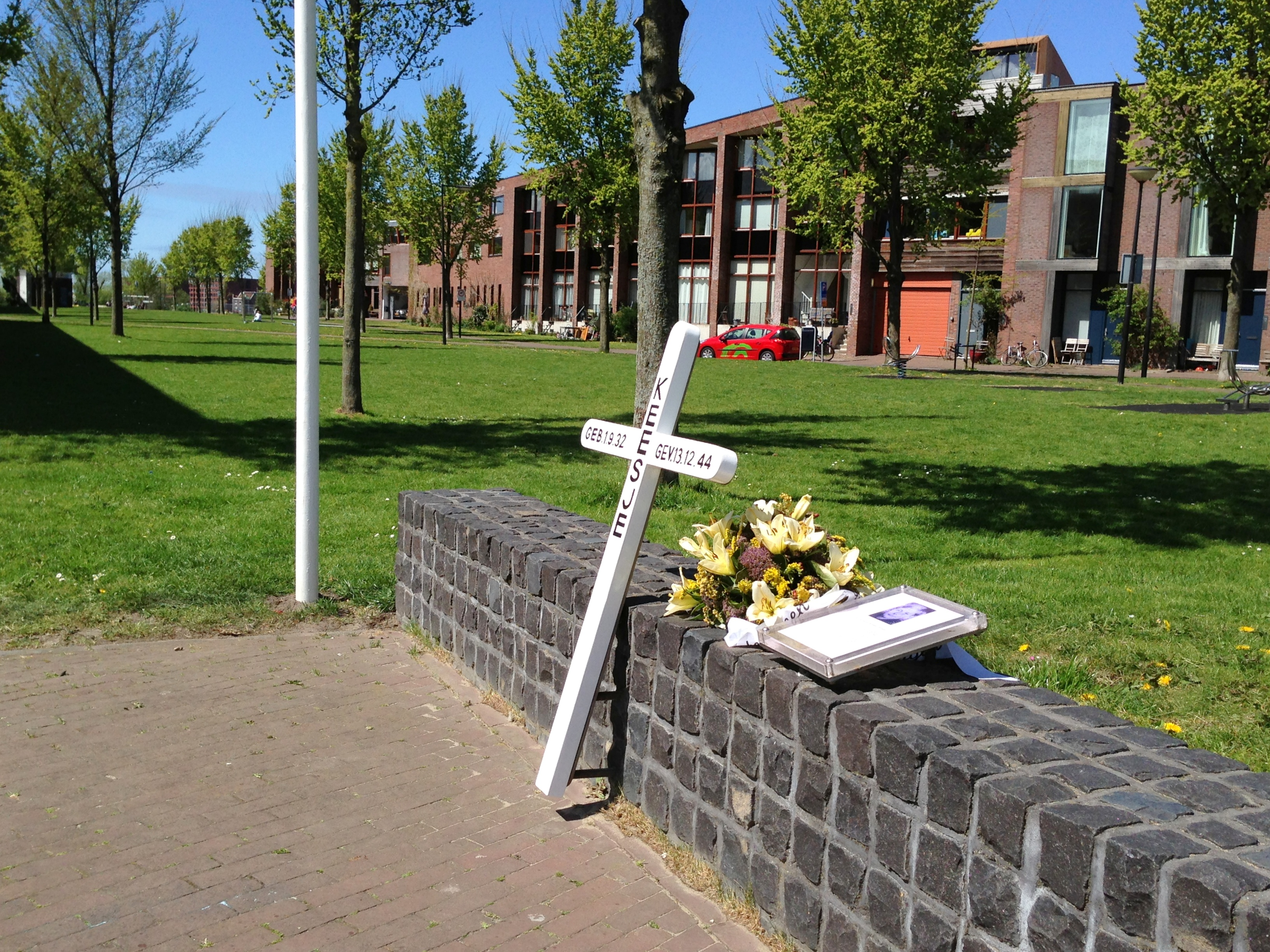 Monument Keesje Brijdeplantsoen Amsterdam 2013